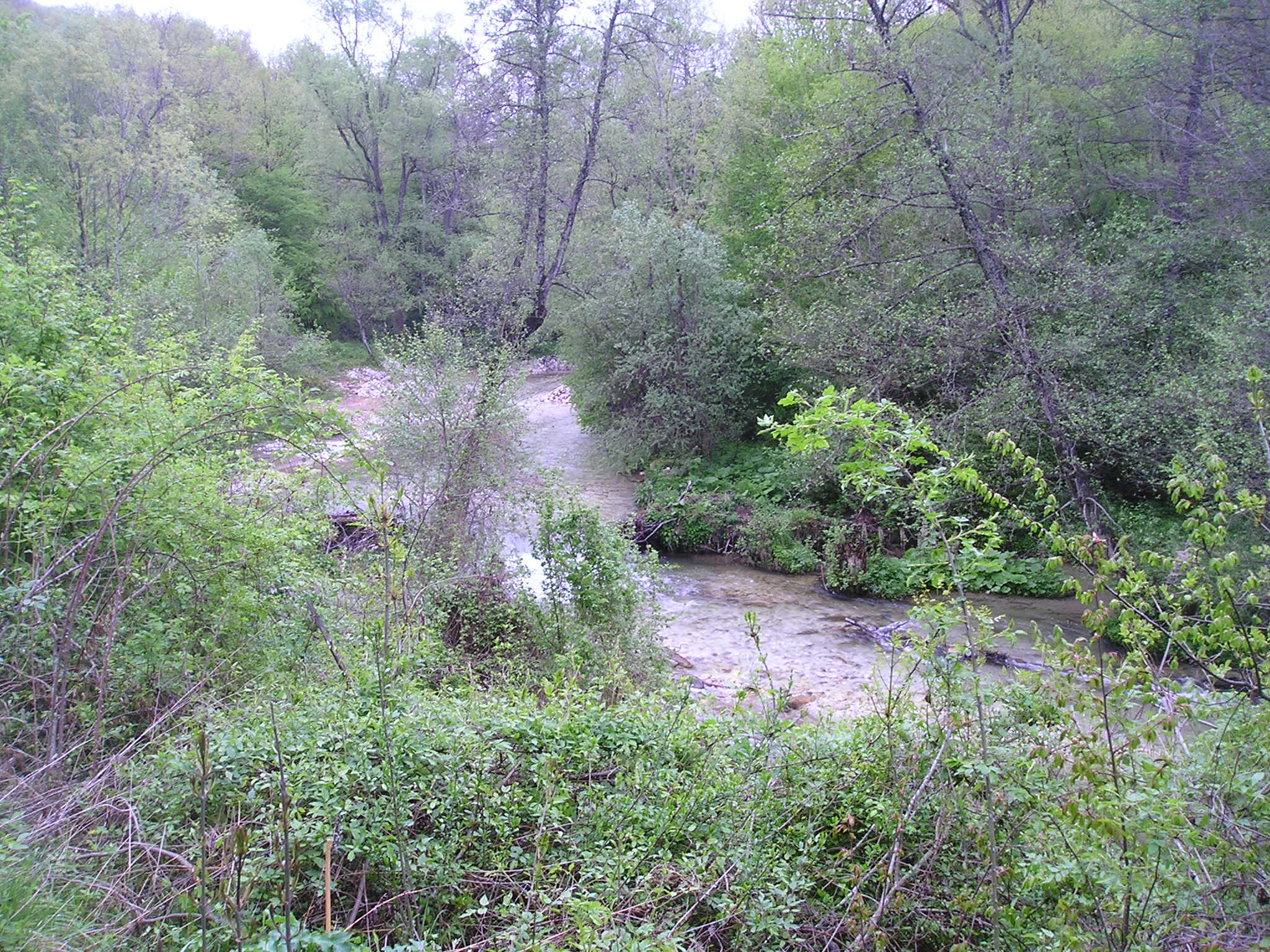 Реката Бабуна в Азот, снимана от пътя Богомила - Папрадище.